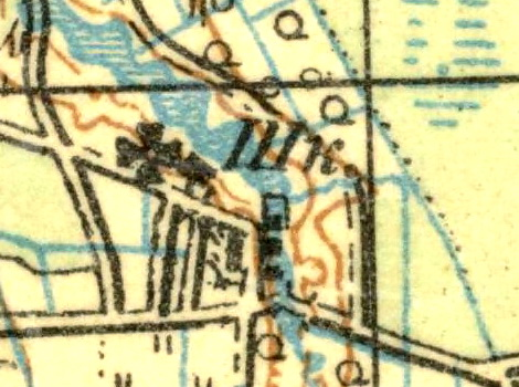 Топографическая карта Ленинградской области, квадрат О-36-14-А (п. Фёдоровский), деревня Мыза